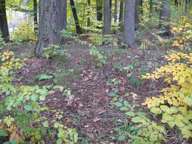 Zaniklá středověká osada Vilémov - reklikty stavení